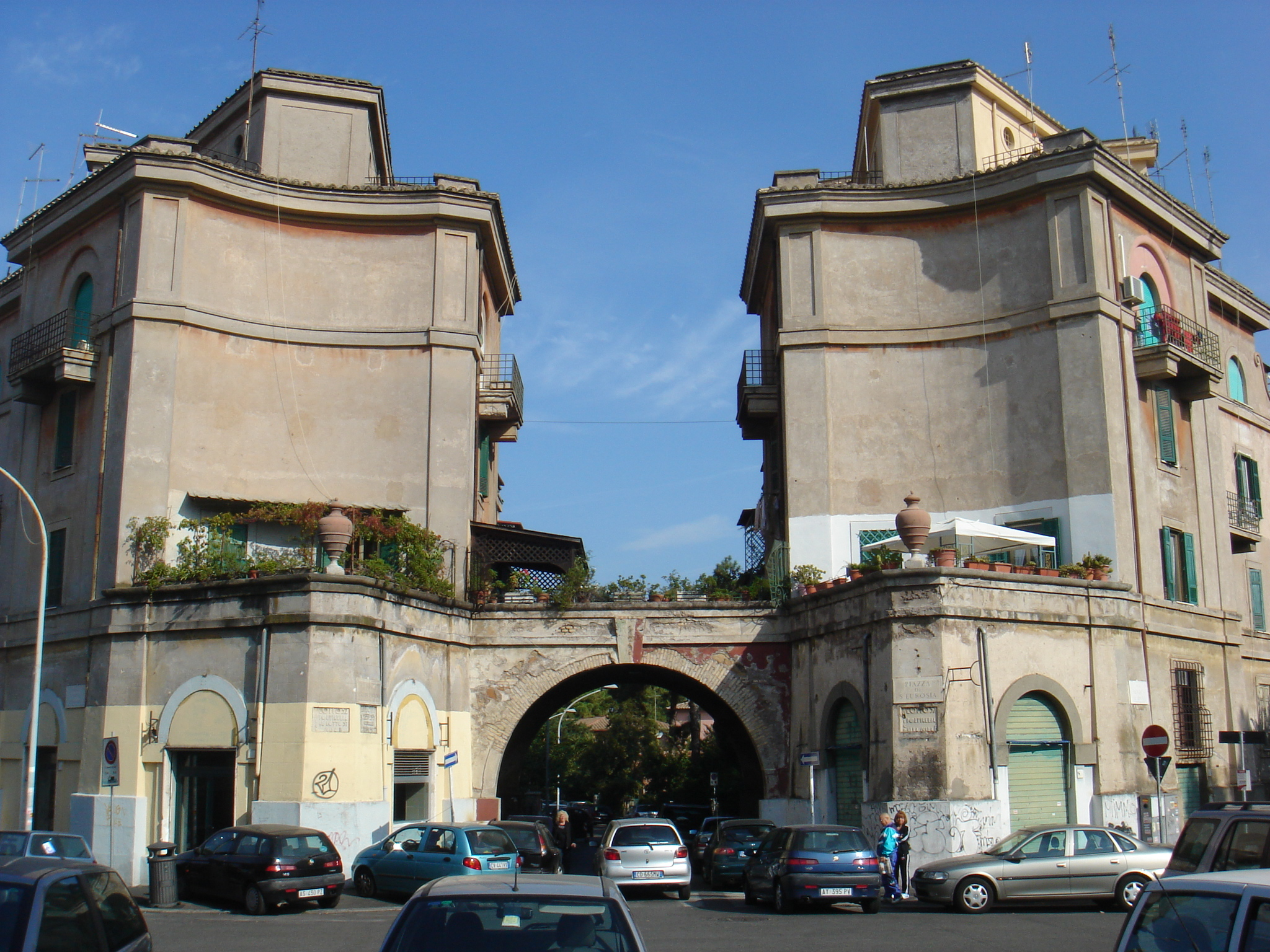 Roma, Garbatella: lotto 57 a piazza Sant'Eurosia Sony Cyber-shot DSC-T7